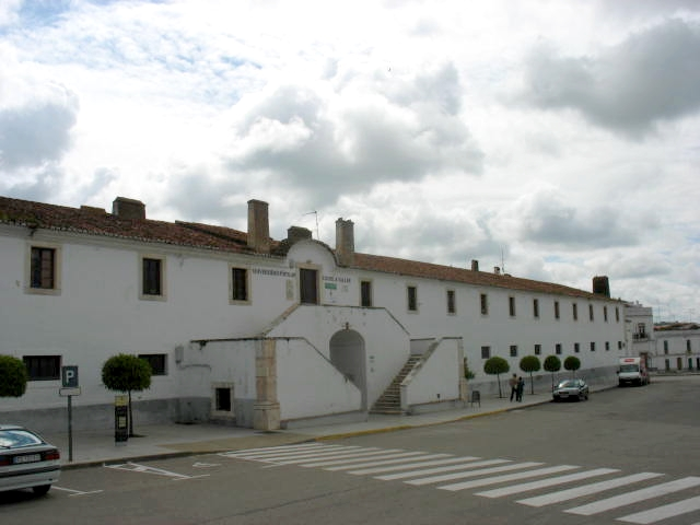 Antigo Quartel dos Dragões de Olivenza (actual Regimento de Cavalaria nº3) - século XVIII - Olivenza (Badajoz, Espanha)